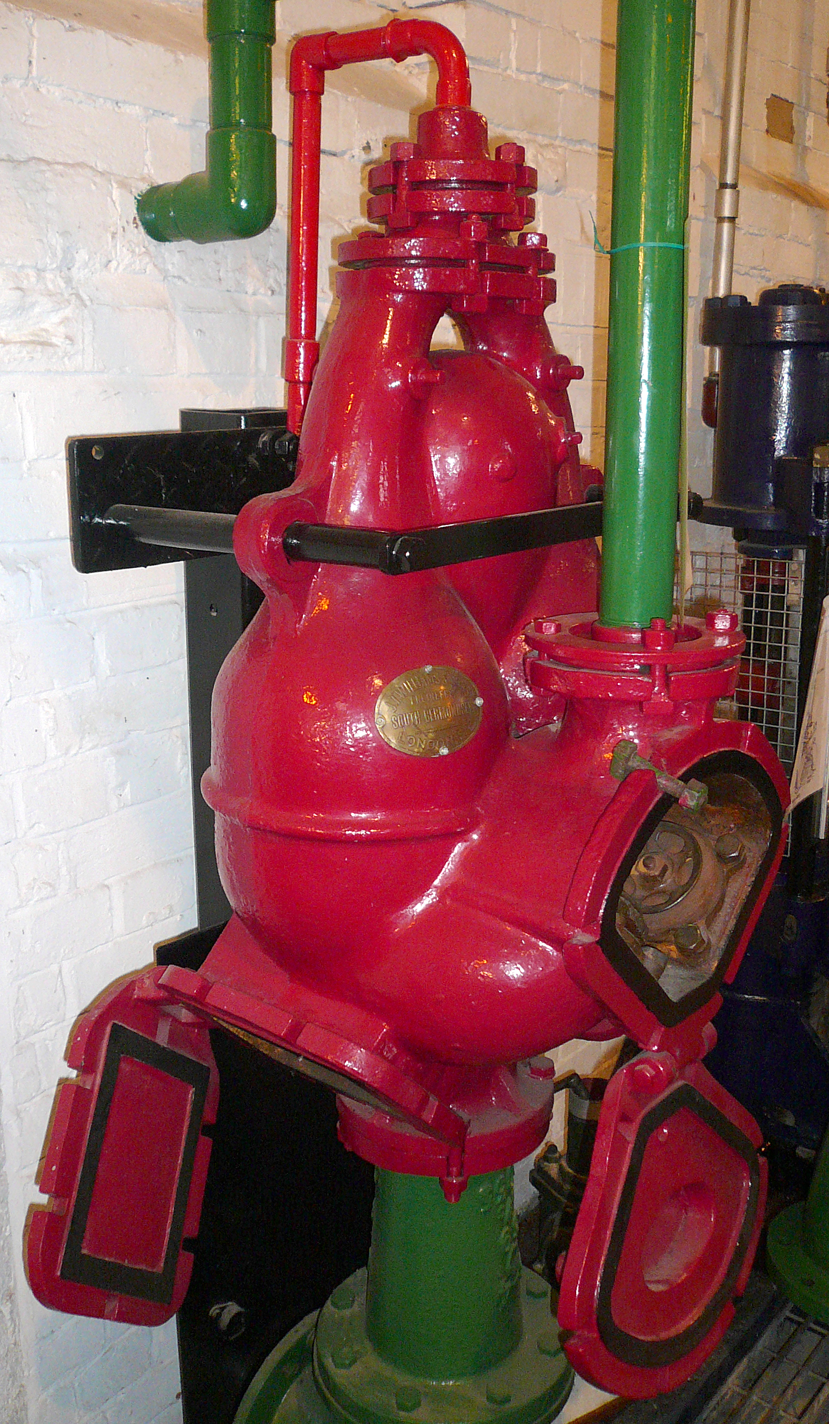 Pulsometer Pumpe in Brede, England